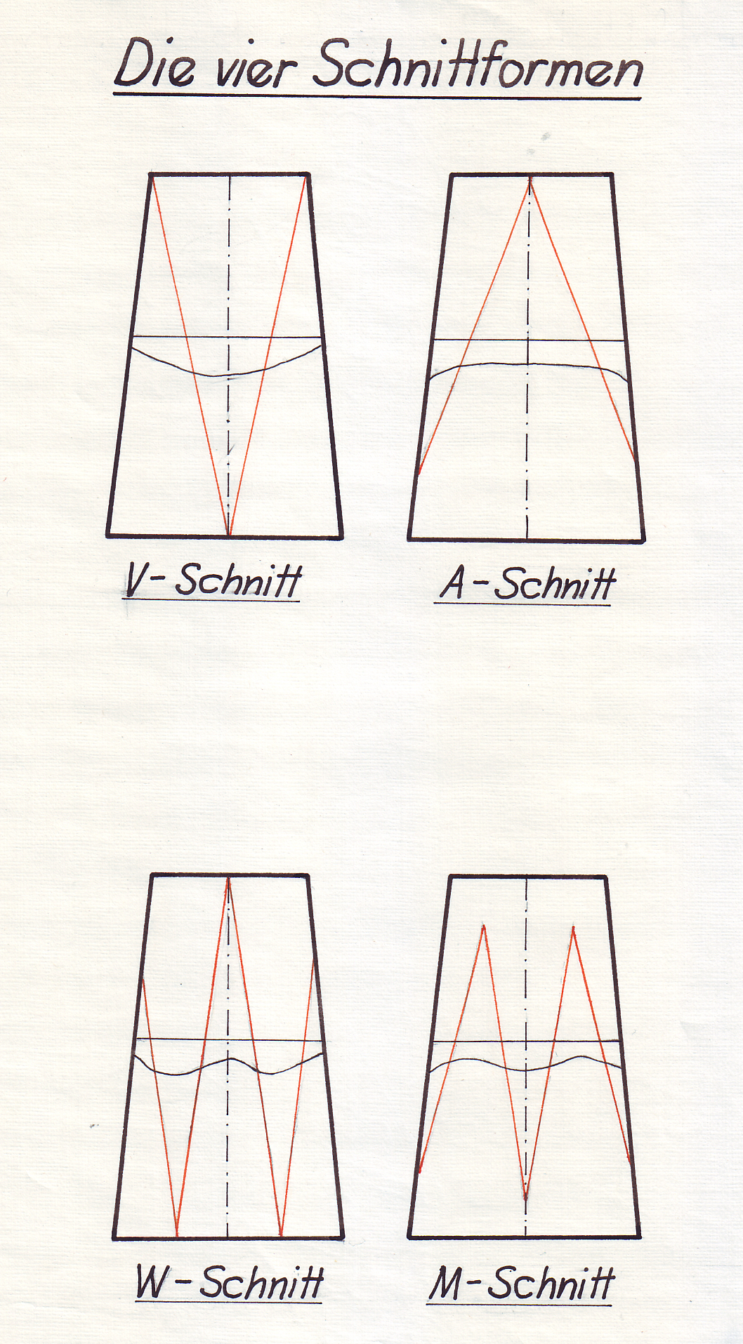 Auslassen von Fellen zur Pelzverarbeitung - Die vier Schnittformen.